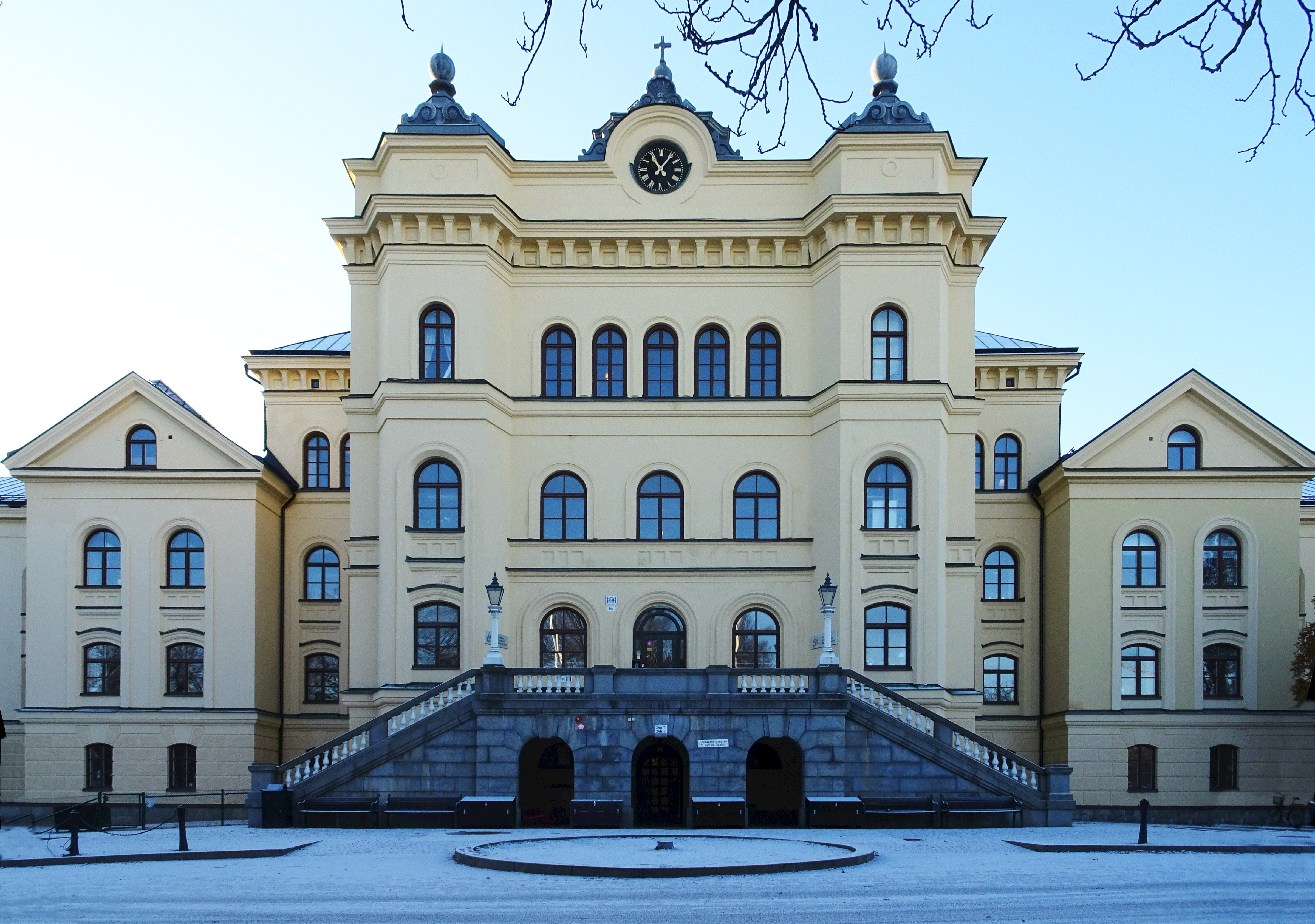 Konradsberg, Kungsholmen, Stockholm